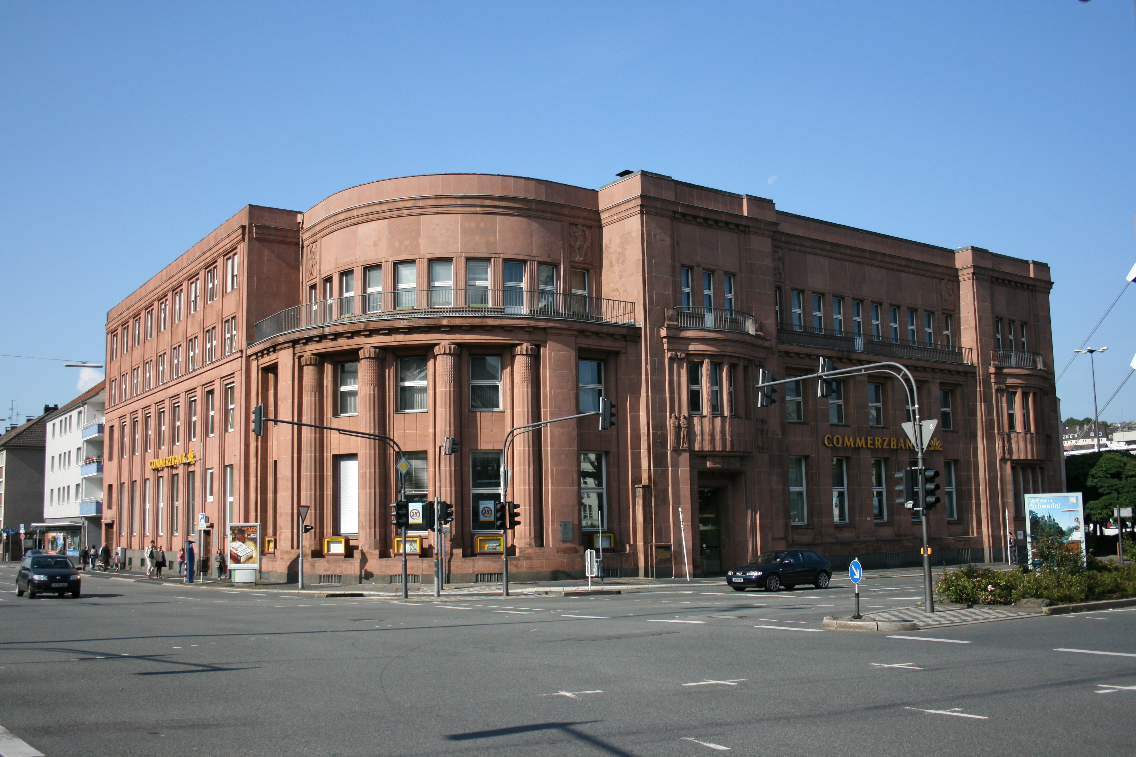 Wuppertal